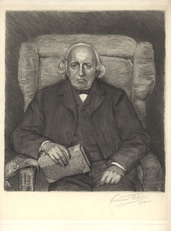 Karl Weierstraß, Lithographie nach einer Radierung